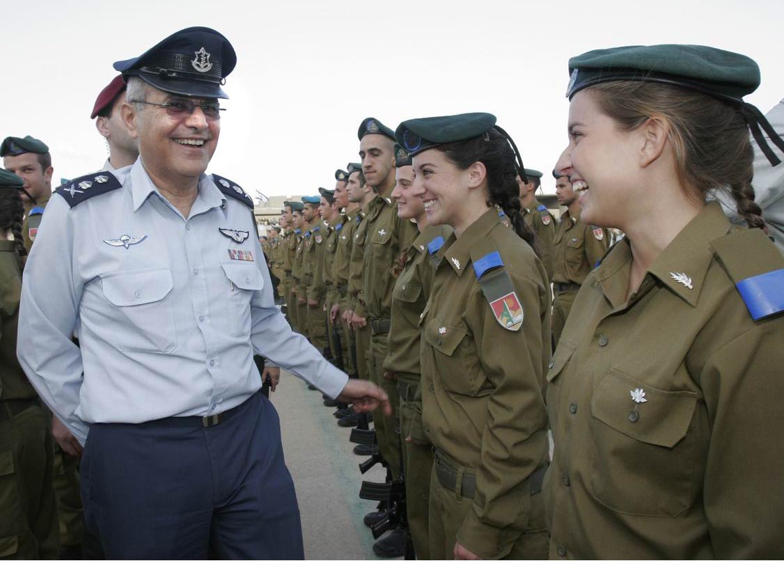 October 26, 2006. Then-Chief of the General Staff, Lieutenant General Dan Halutz, greets the female soldiers graduating the Ground Forces Officers Course. הרמטכ"ל בזמנו רא"ל דן חלוץ מברך את בוגרות קורס קצינים אשר יפקדו בזרוע היבשה.